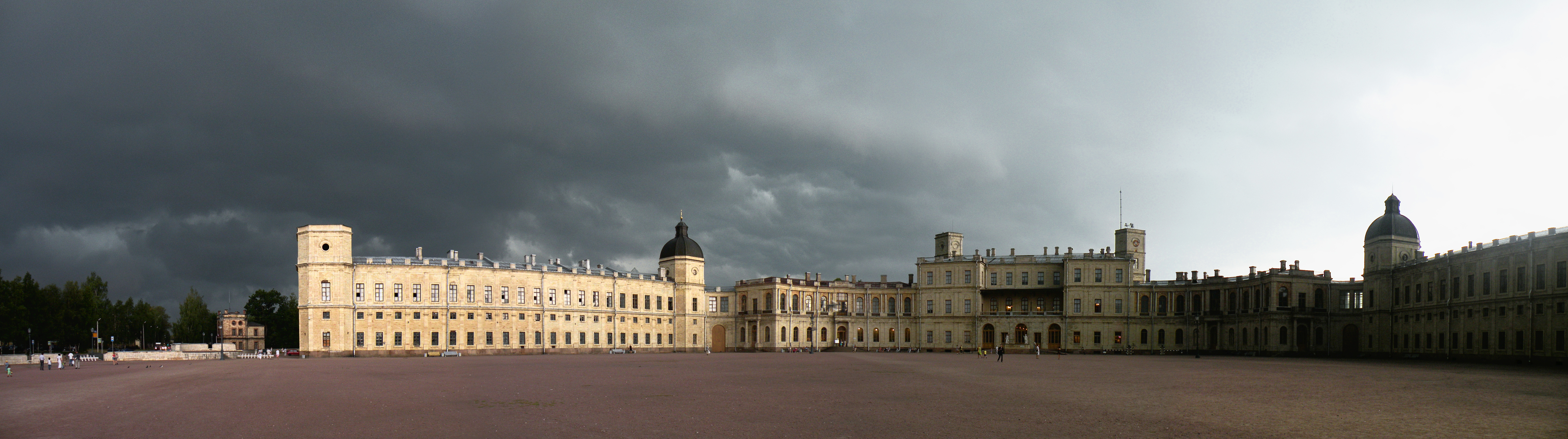 Гатчина. Дворец перед бурей.